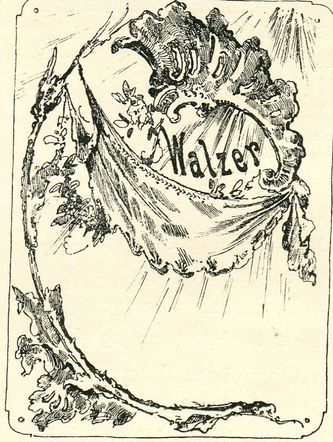 Tanzkarte für ein Fest des Vereins für Kunst und Wissenschaft Hamburg